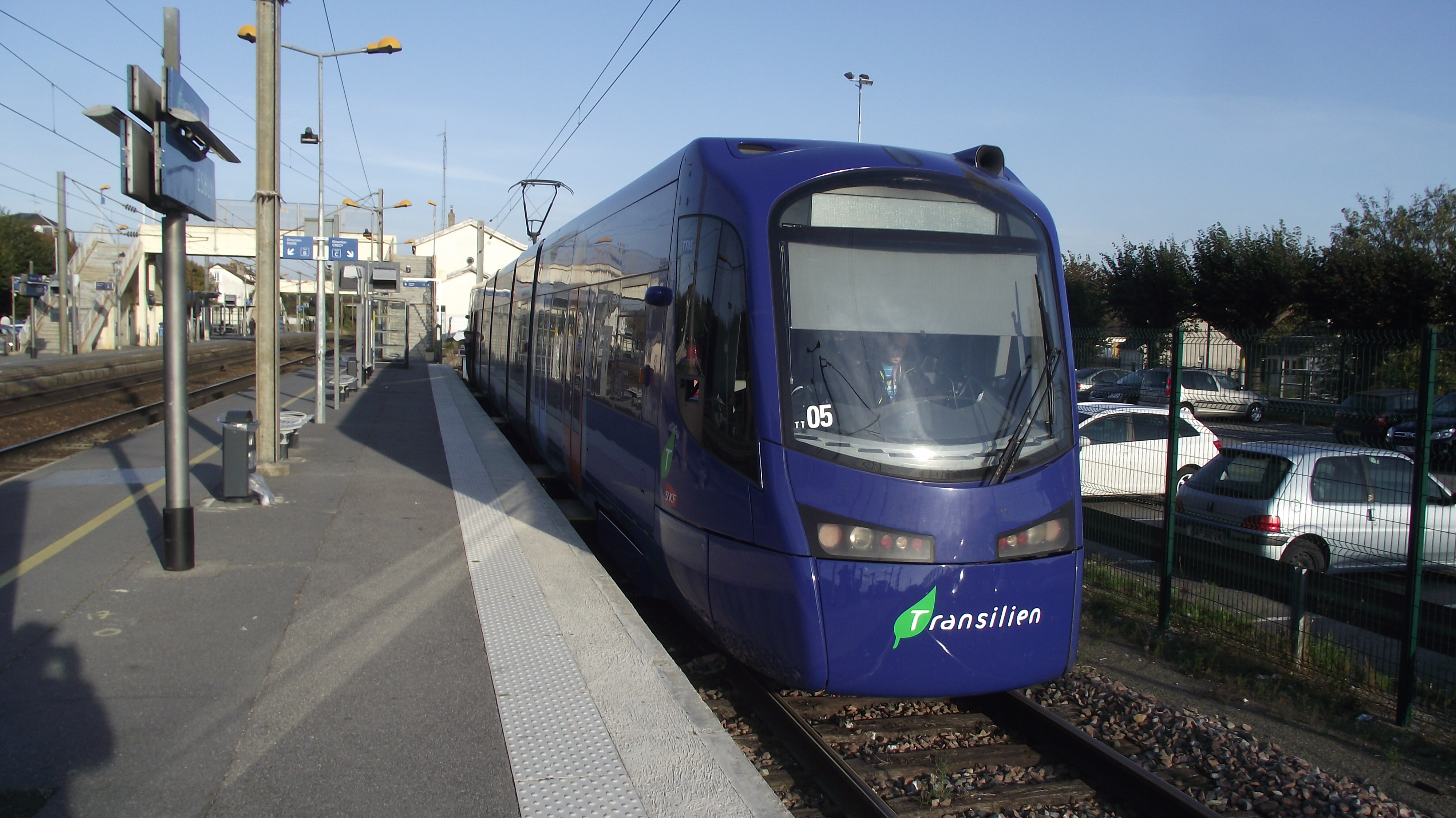 Tram-trein op een zijspoor voor Crécy la Chapelle